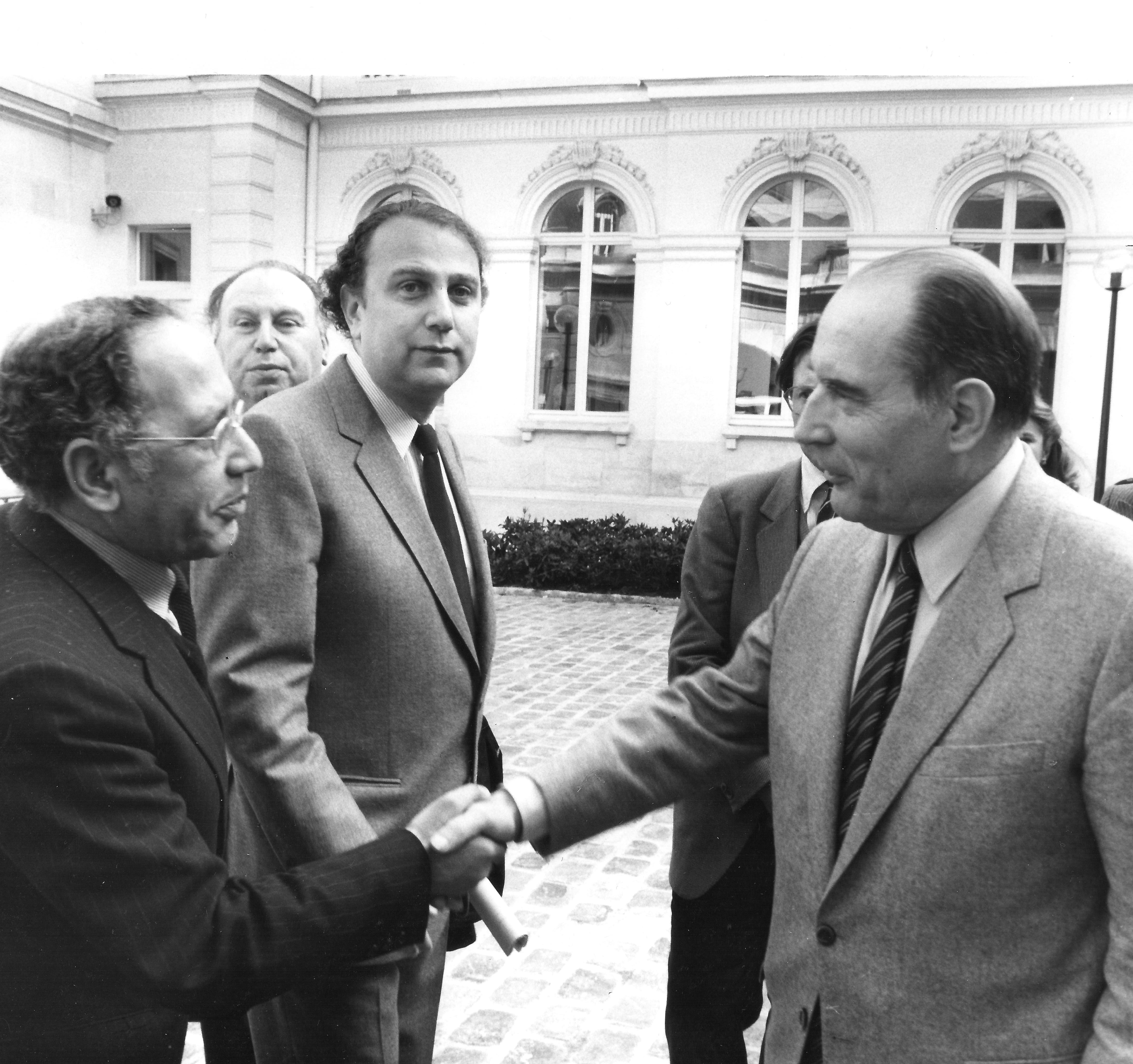 פגישה עם רמ"מ צרפת מיטראן לקראת הסיבוב השני בבחירות לנשיאות צרפת ב-מאי 1981